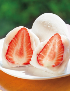 Enshū Ōtsubu Kanjuku Ichigo Daifuku was made by the Takoman Co., Ltd.